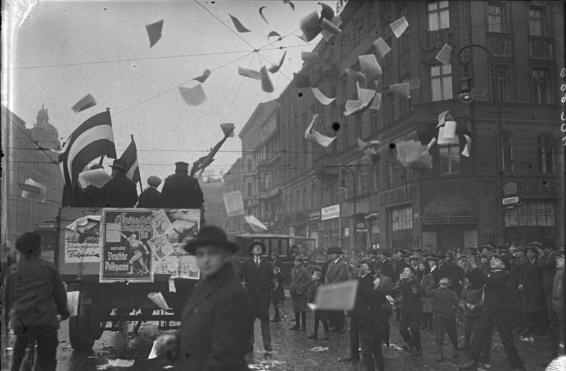 Reichstagswahlen am 7.12.1924 Lastwagen der Deutschen Volkspartei durchfahren Berlin